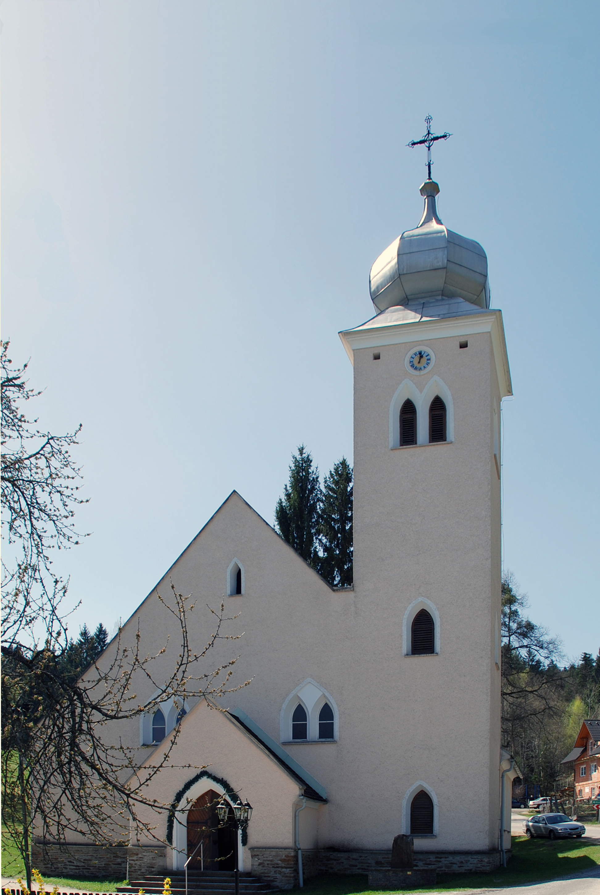 Marhof Rachling Kapelle bei Höllerhansl, Weststeiermark